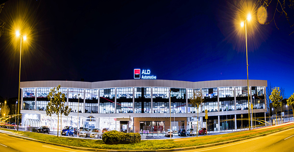 Sede de ALD Automotive España